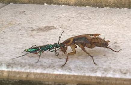 Vespa Joia arrastando uma barata